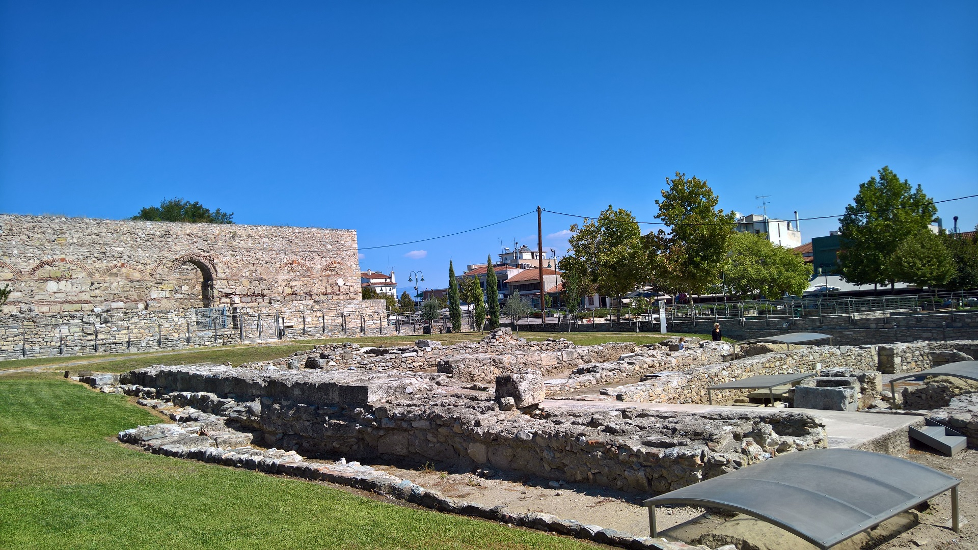 Αρχαιολογικός χώρος Φρουρίου Λάρισας«Αρχαιολογικός χώρος Φρουρίου Λάρισας»